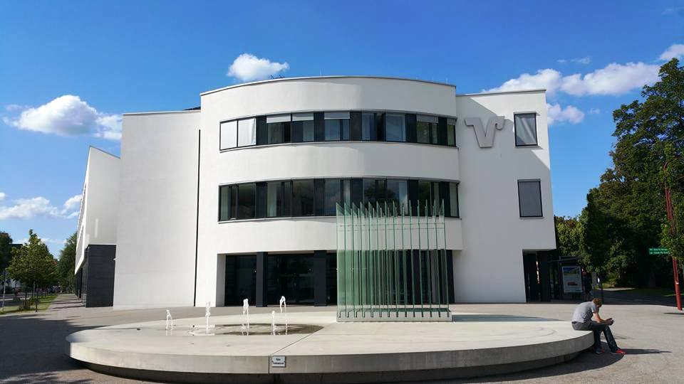 Villingen-Schwenningen, Hauptstelle der Volksbank Schwarzwald-Baar-Hegau, Am Riettor, Villingen